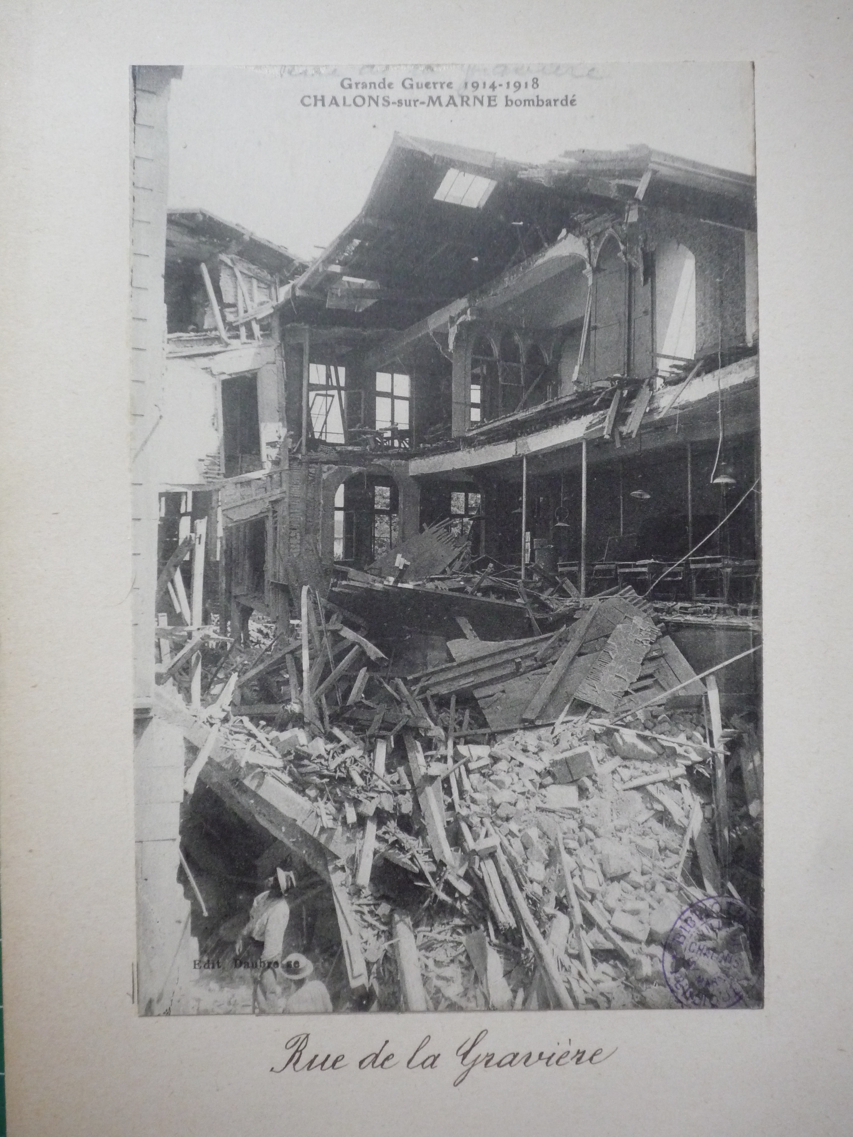 Rue de la Gravière maisons effondrées.